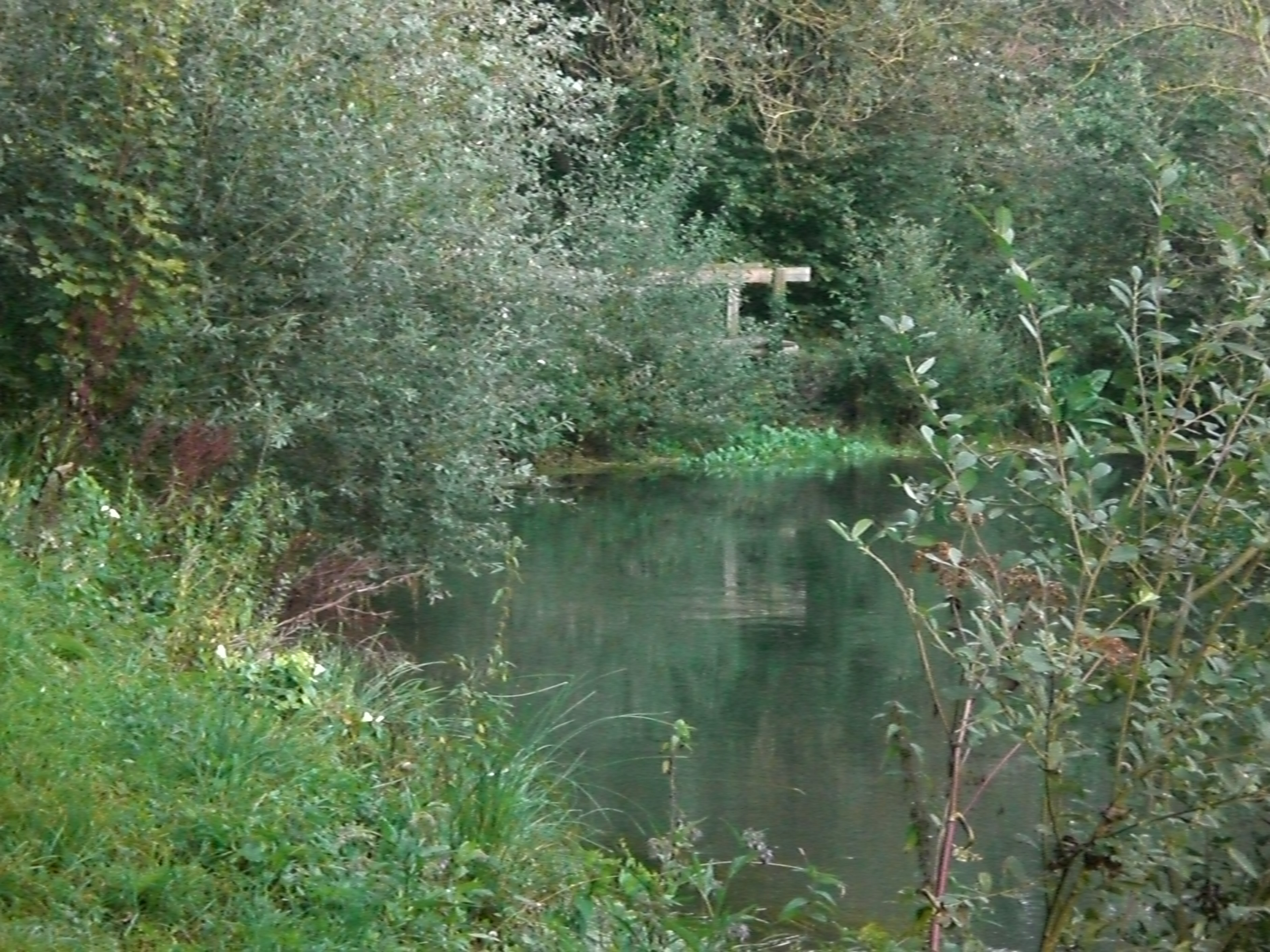 L'Avre à confluence de la Luce à Thézy-Glimont